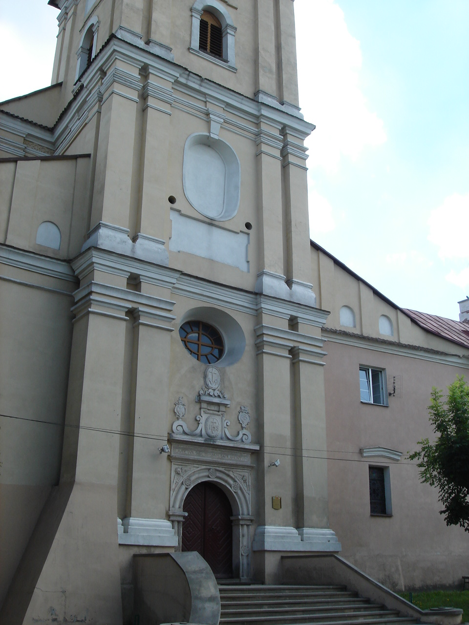 Kościół pw. Św. Katarzyny Aleksandryjskiej w Szczebrzeszynie